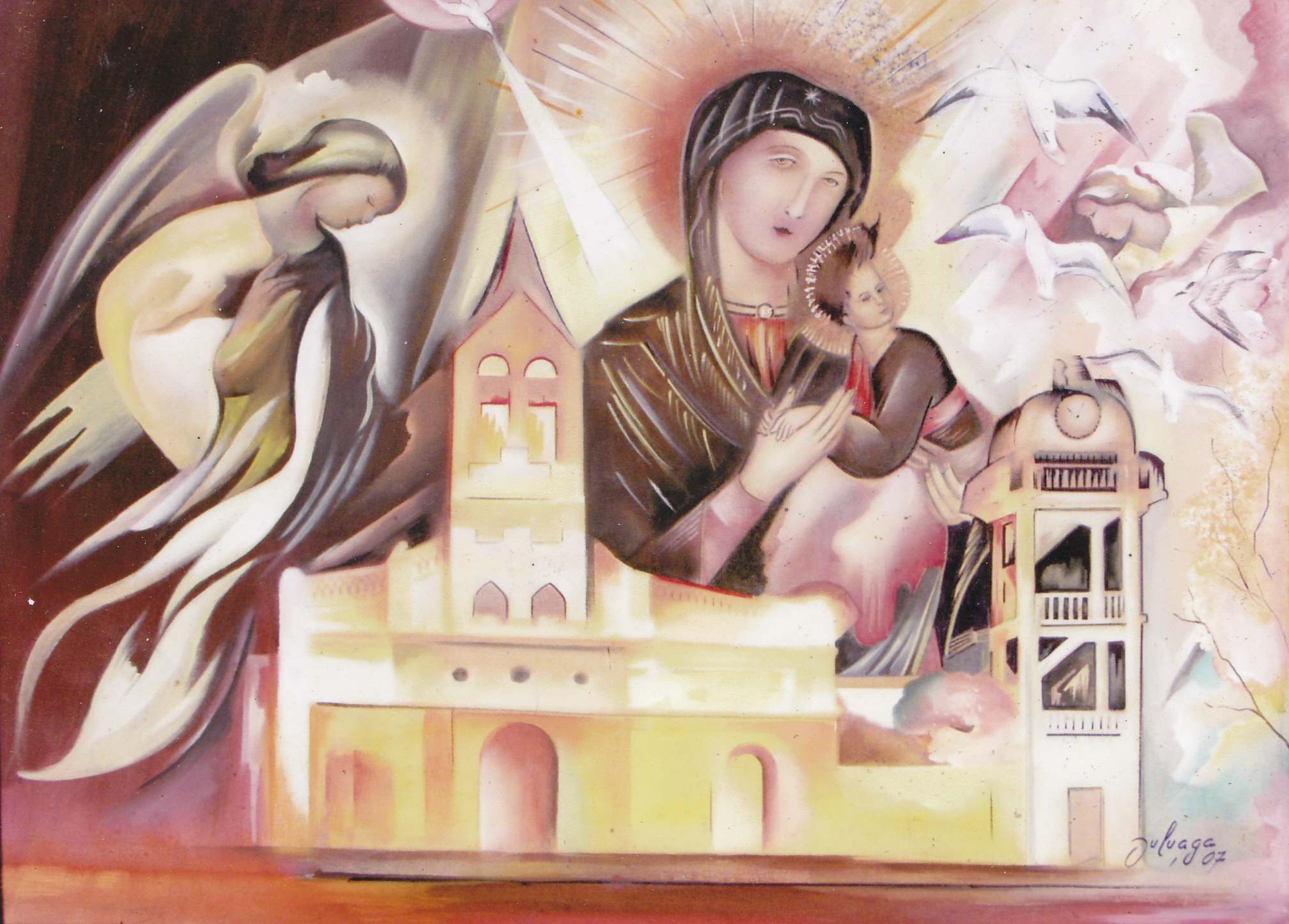 Virgen del Socorro